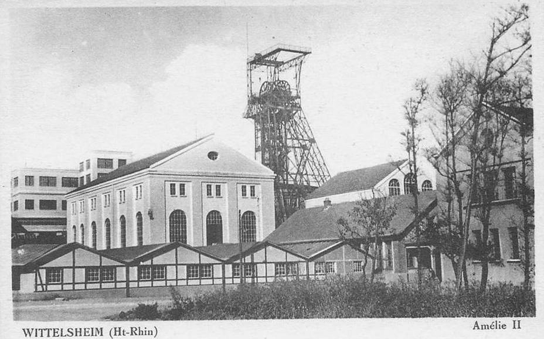 Puits Amelie II (Mines Domaniales de potasses d'Alsace).